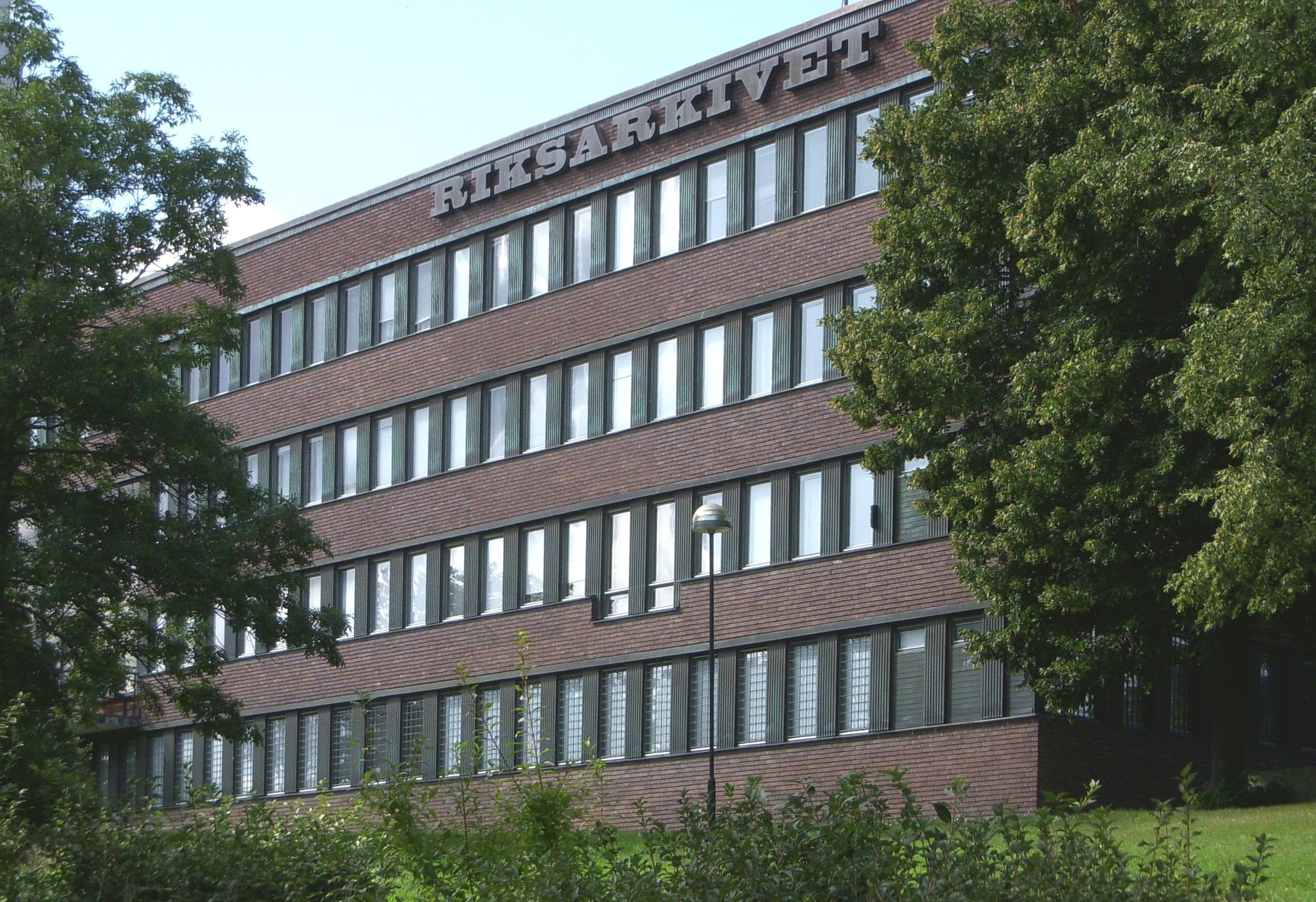 Riksarkivets byggnad i Stockholm 2009 Own work by Holger Ellgaard